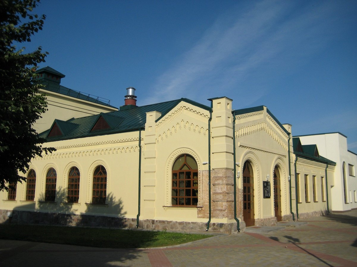 Краявіды Слоніма